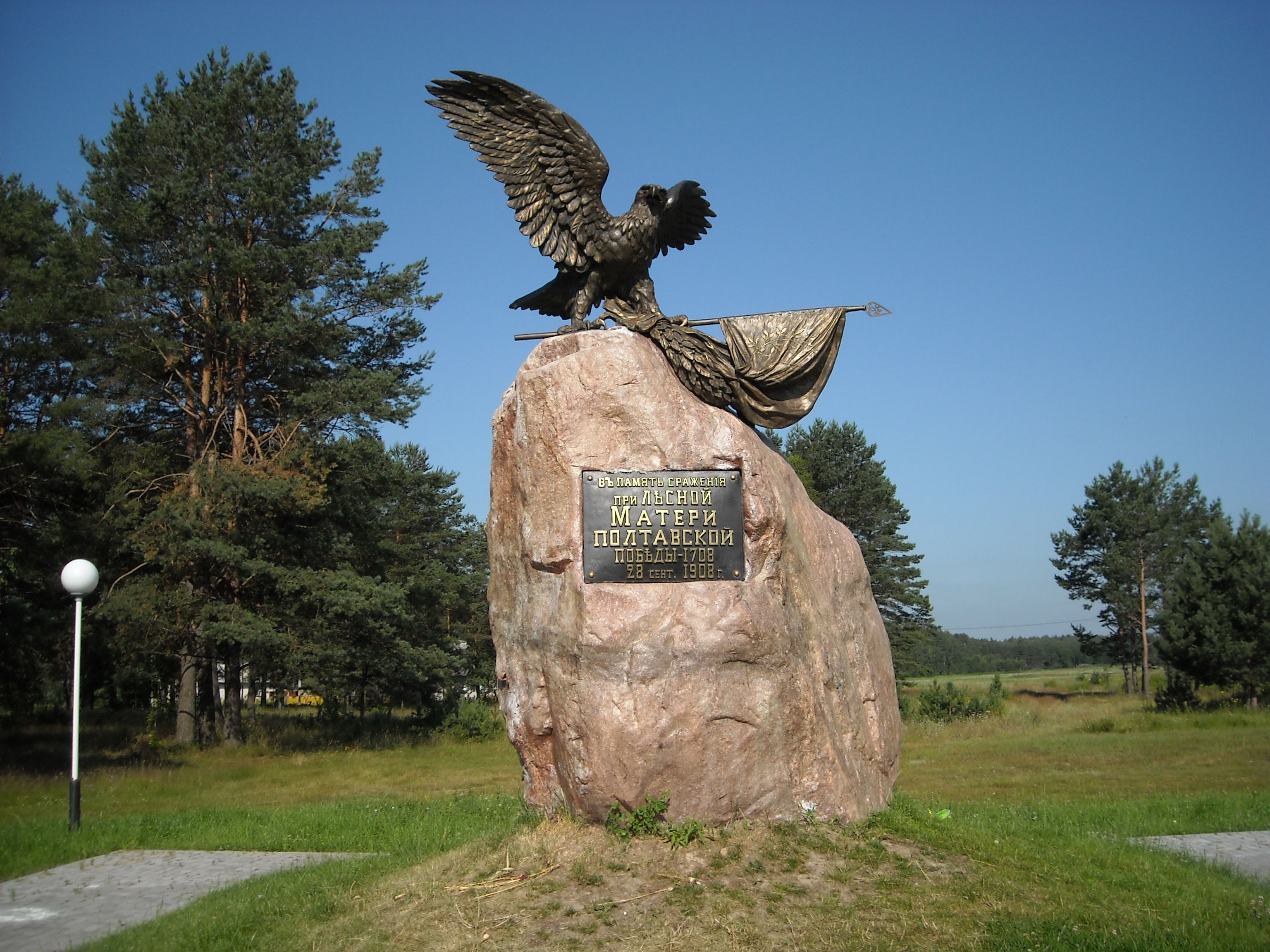 Беларуская (тарашкевіца): Помнік у гонар перамогі расейскіх войскаў у бітве пры Лясной. в. Лясная This is a photo of Belarusian heritage monument. Reference number: 511Д000532 ( WLM)